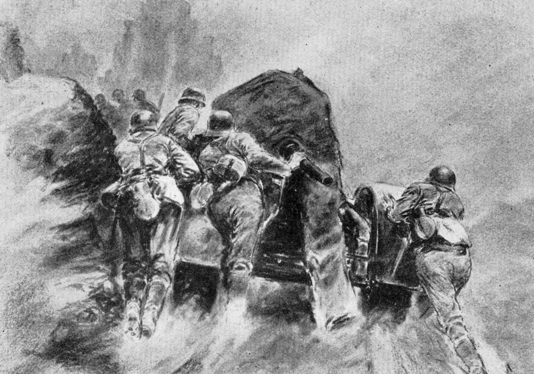 Flak im Balkan 1942